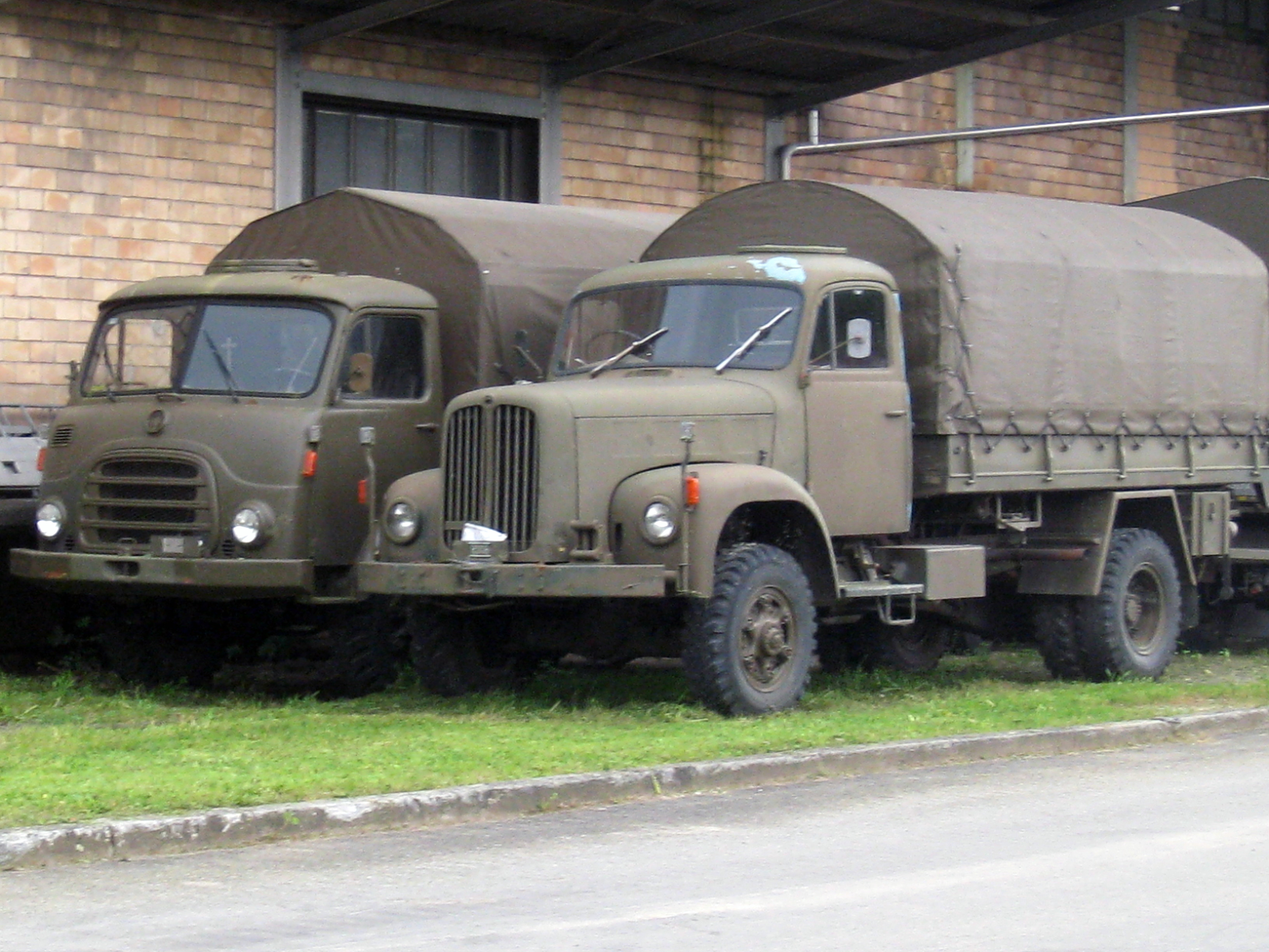 Schweizer Militärlastwagen beim Militärmuseum Full